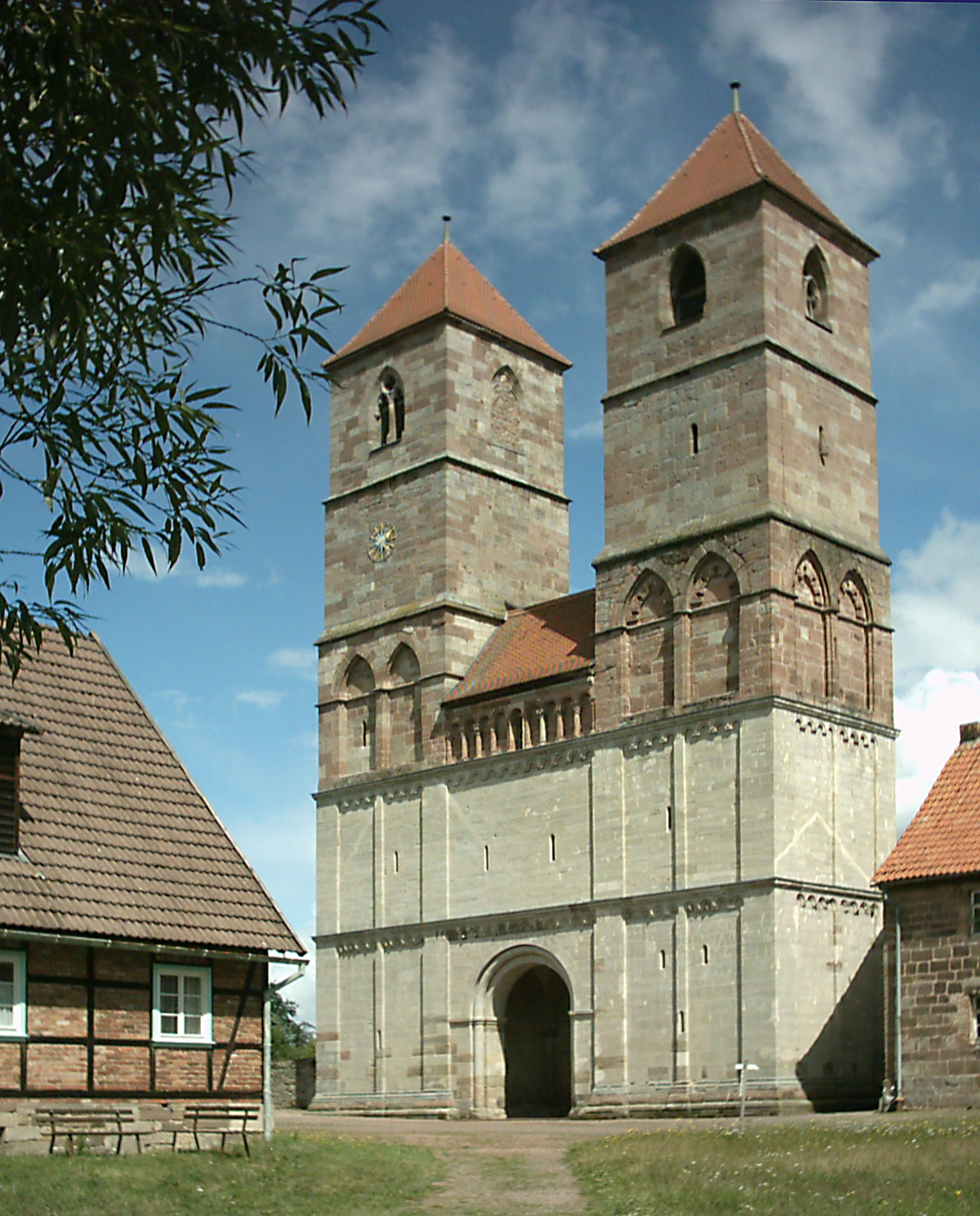 Kloster Veßra: Kirchenruine aus Nordwesten Fotograf: presse03, selbst fotografiert 2005 Lizenz: GNU-FDL Kategorie:Bild:Kirche